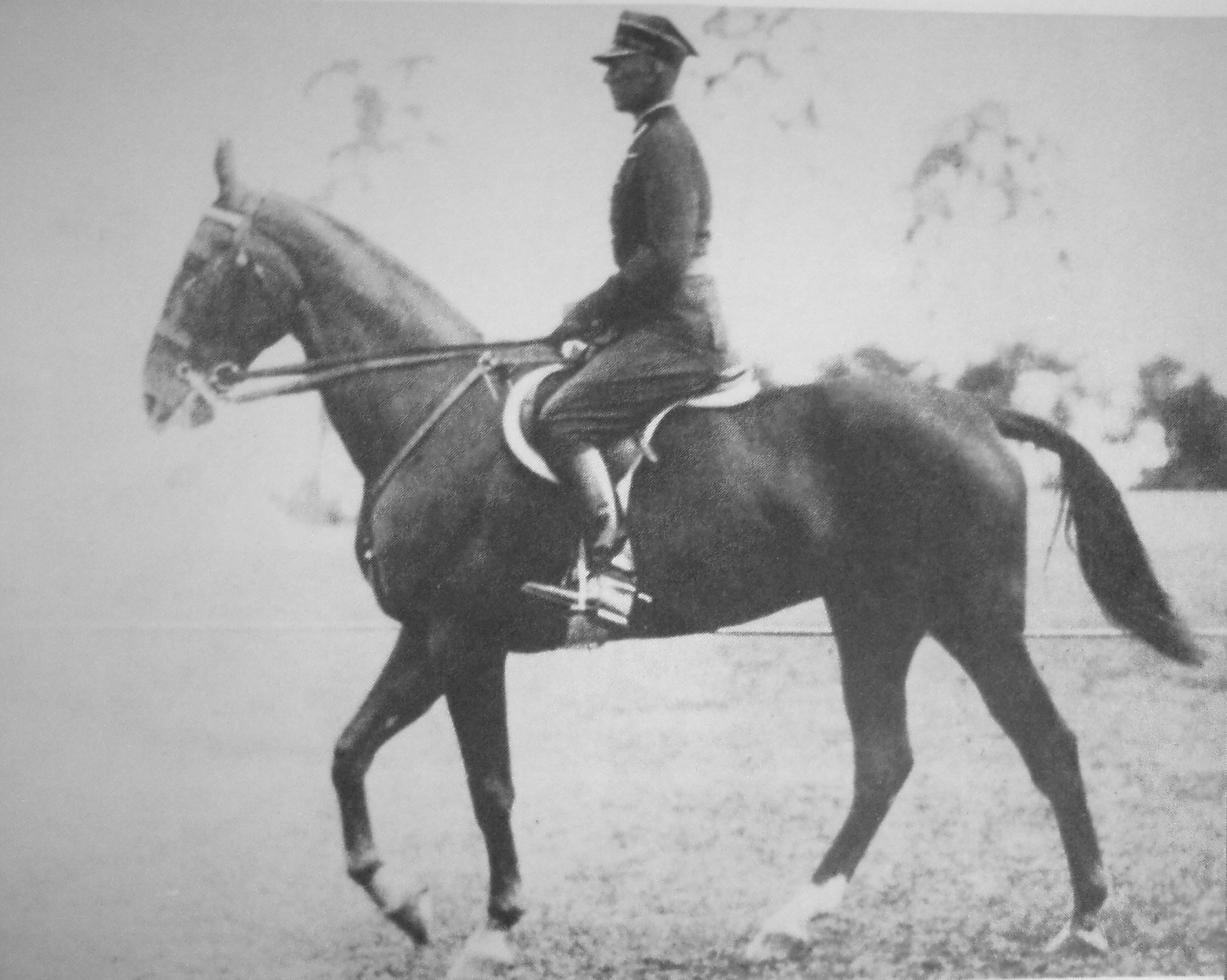 Rtm. Henryk Roycewicz (25 Pułk Ułanów Wielkopolskich) na wałachu "Arlekin III" podczas próby ujeżdżenia WKKW na Olimpiadzie w Berlinie w 1936 roku.